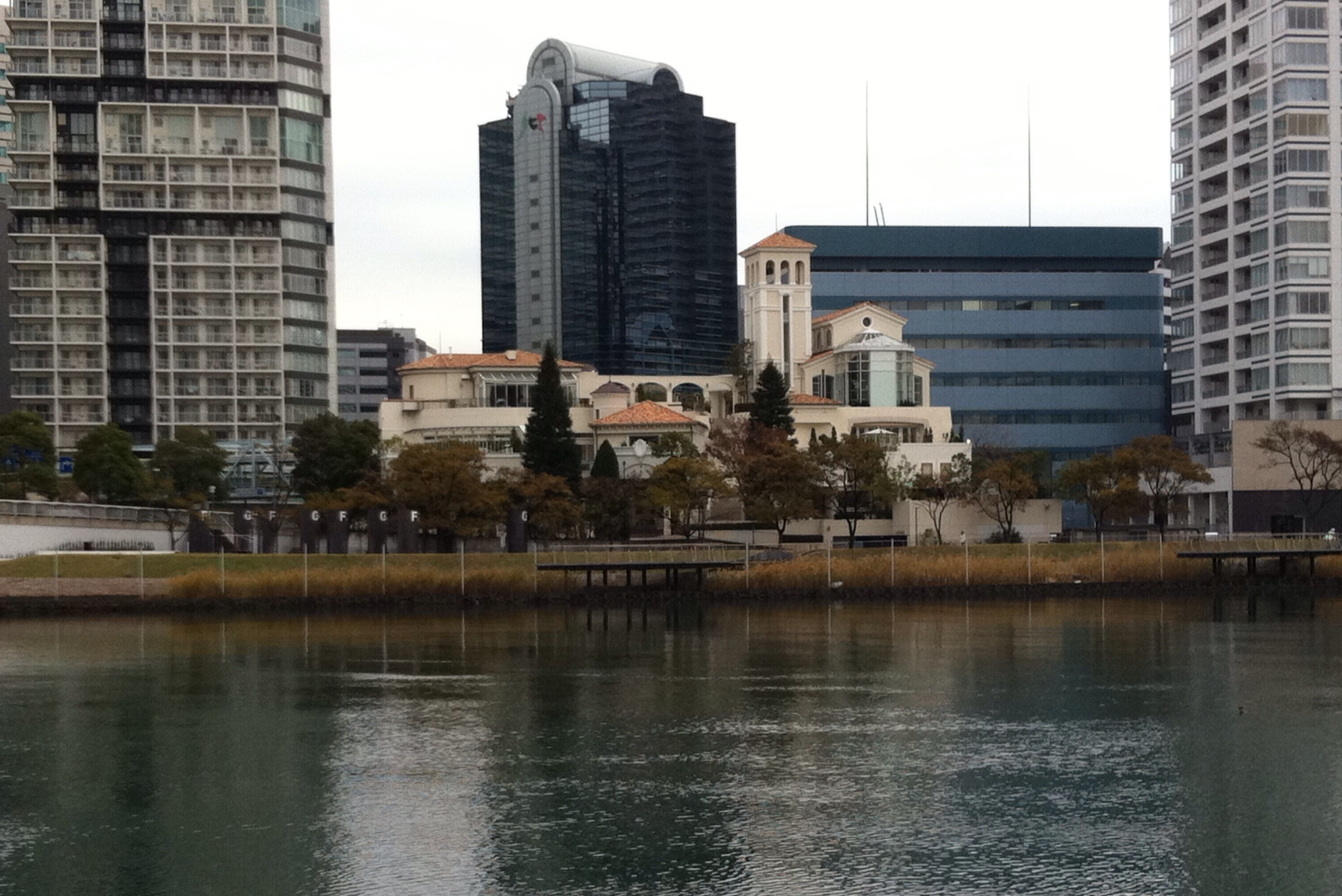 高島水際線公園よりポートサイド地区を望む。